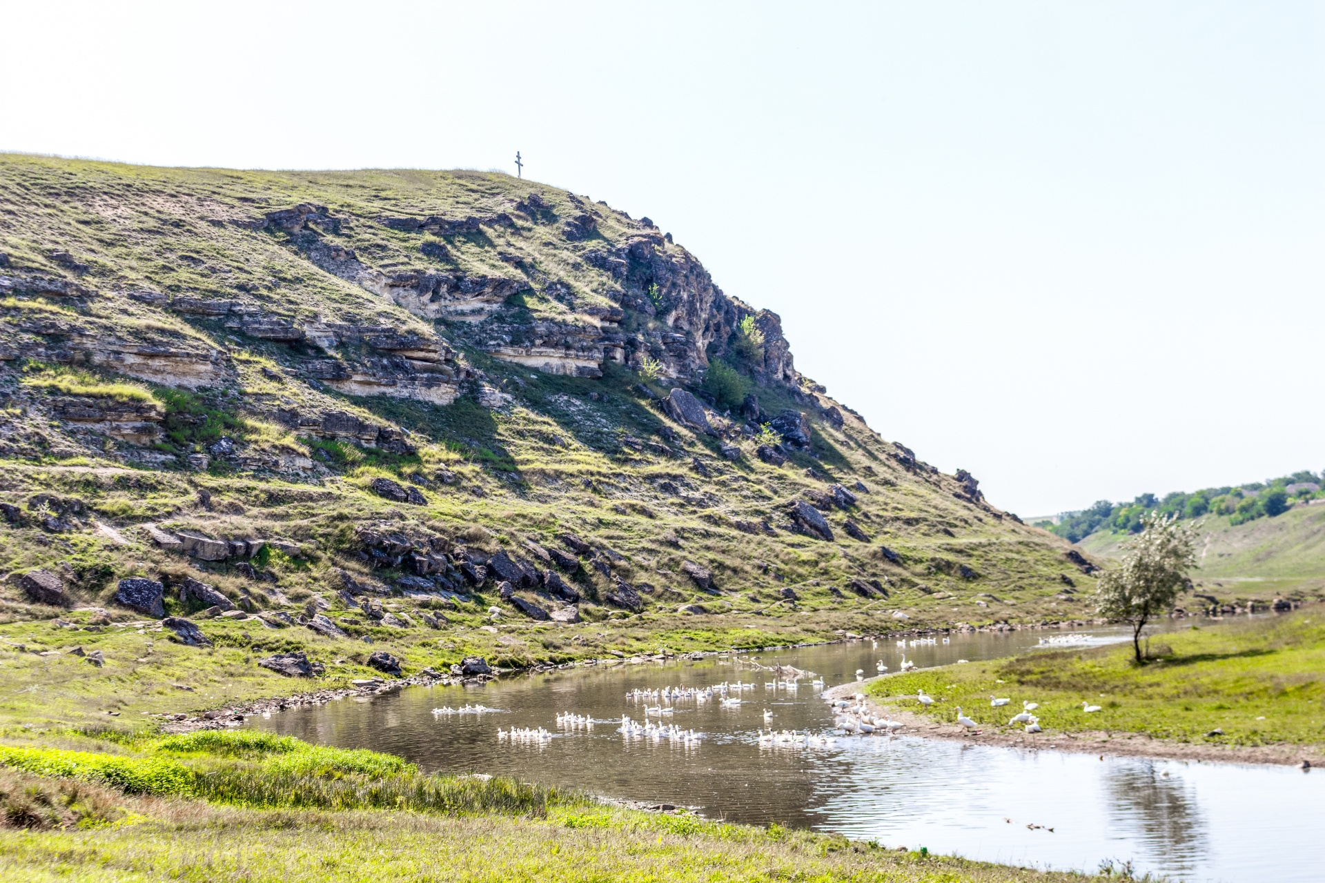 Скала «Мыгла», монумент природы, находится в Орхейский район, В. 0,5 км к северо-западу от с. Пятра (код MD-OR-mn.A-057) A-057